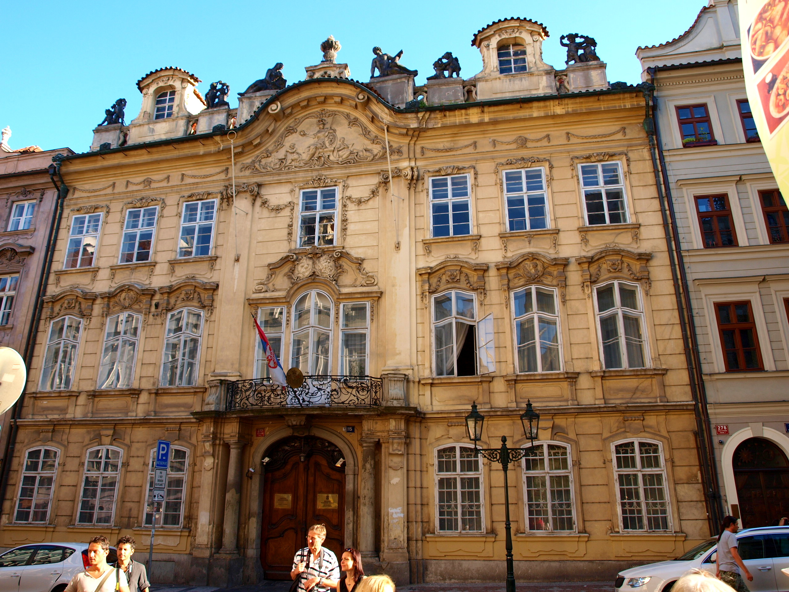 Kounický palác, Praha